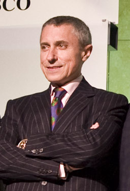 Melchor Miralles en la celebración en el Museo Guggenheim de Bilbao del vigésimo aniversario de la edición del País Vasco de El Mundo